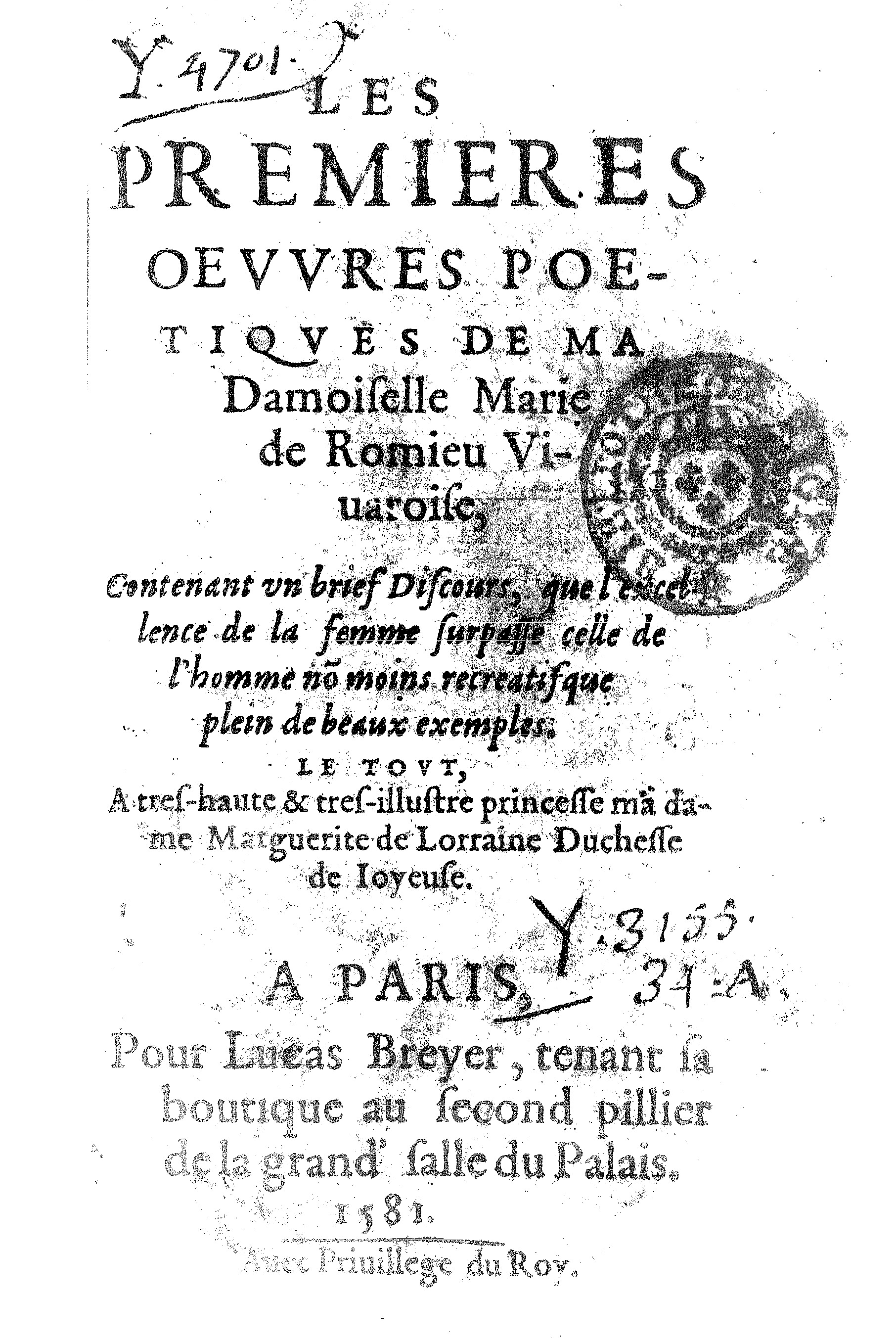 Les premières oeuvres poétiques de Mademoiselle Marie de Romieu, Vivaroise , contenant un brief discours que l'excellence de la femme surpasse celle de l'homme, non moins recréatif que plein de beaux exemples... Éditeur : L. Breyer (Paris) 1581